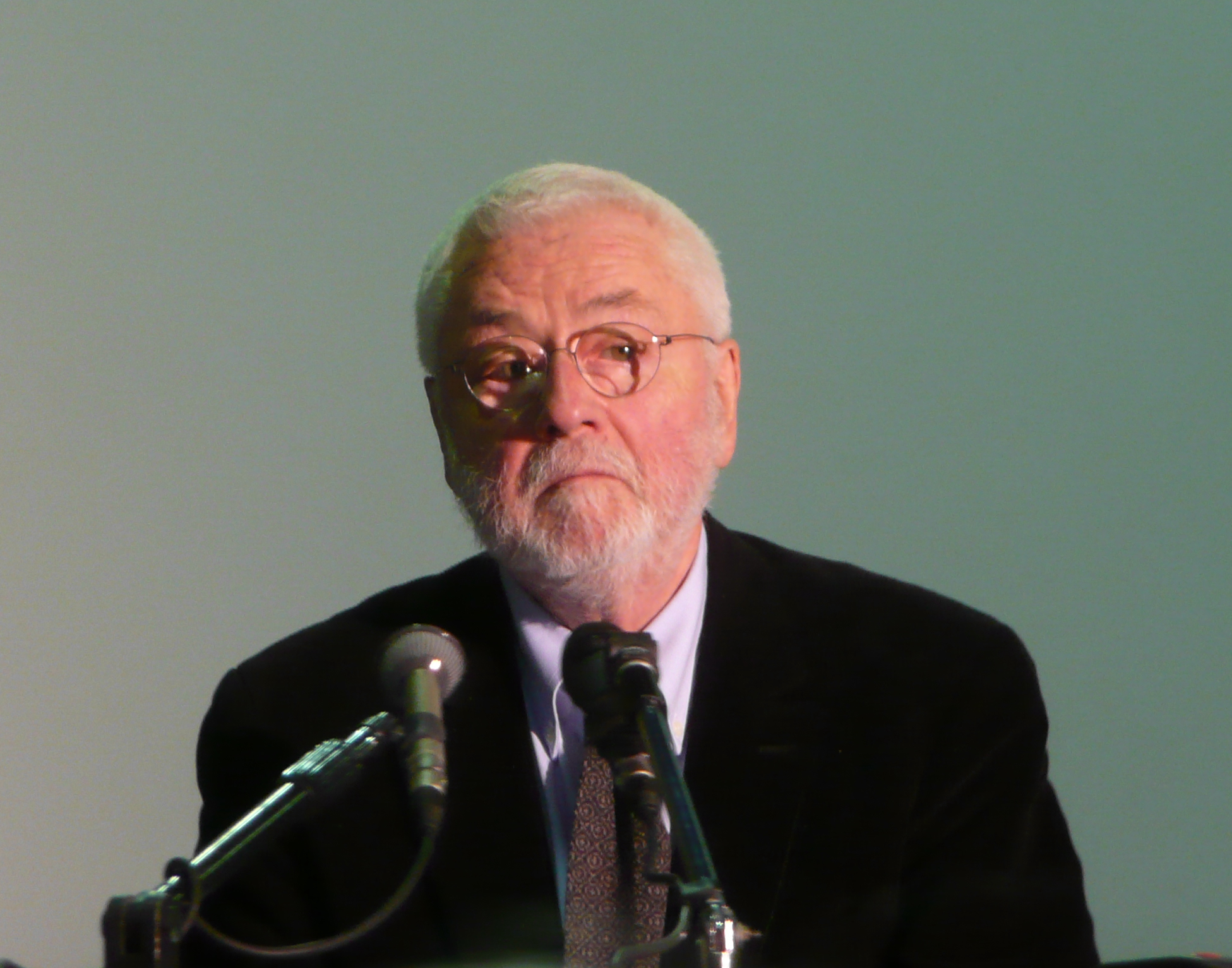 Daniel Roche, historien français, conférence au Lycée Le Corbusier d'Aubervilliers dans le cadre des « Lundis du Collège de France », le 4 octobre 2010.